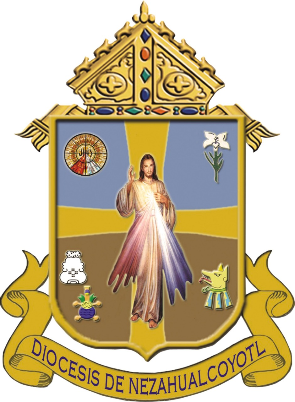 escudo de la parroquia